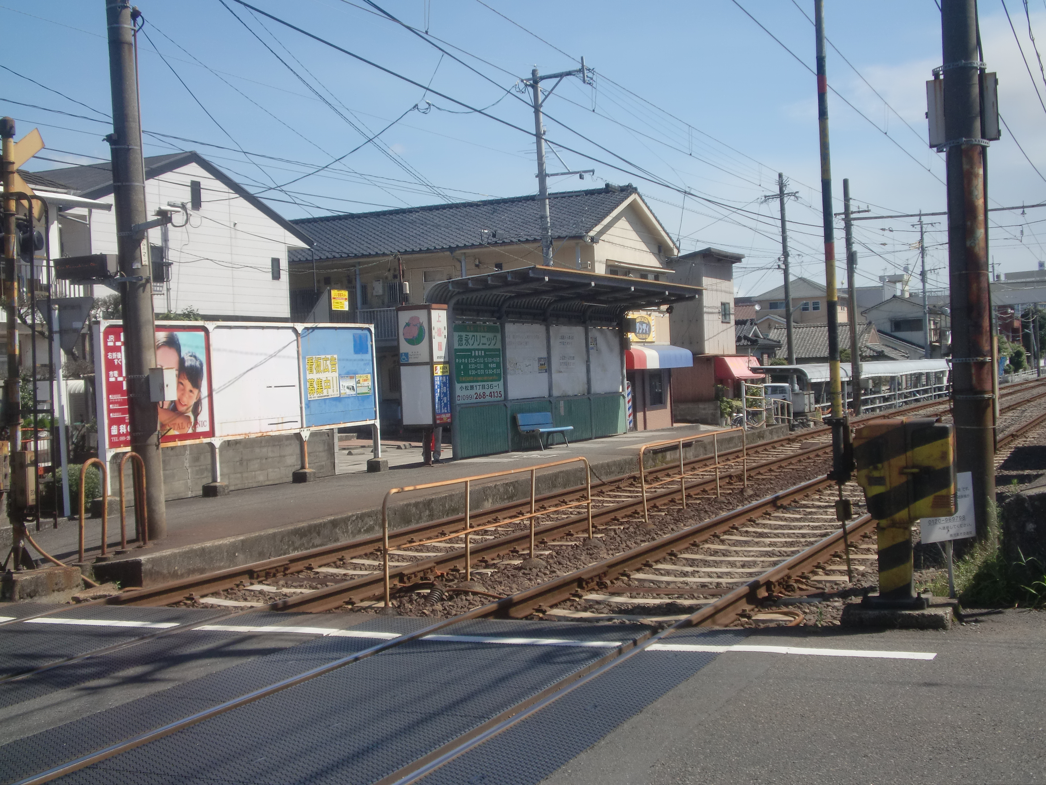 上塩屋駅外観。